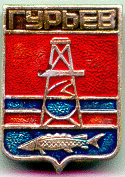 Герб Гурьева (нынешнем как Атырау)